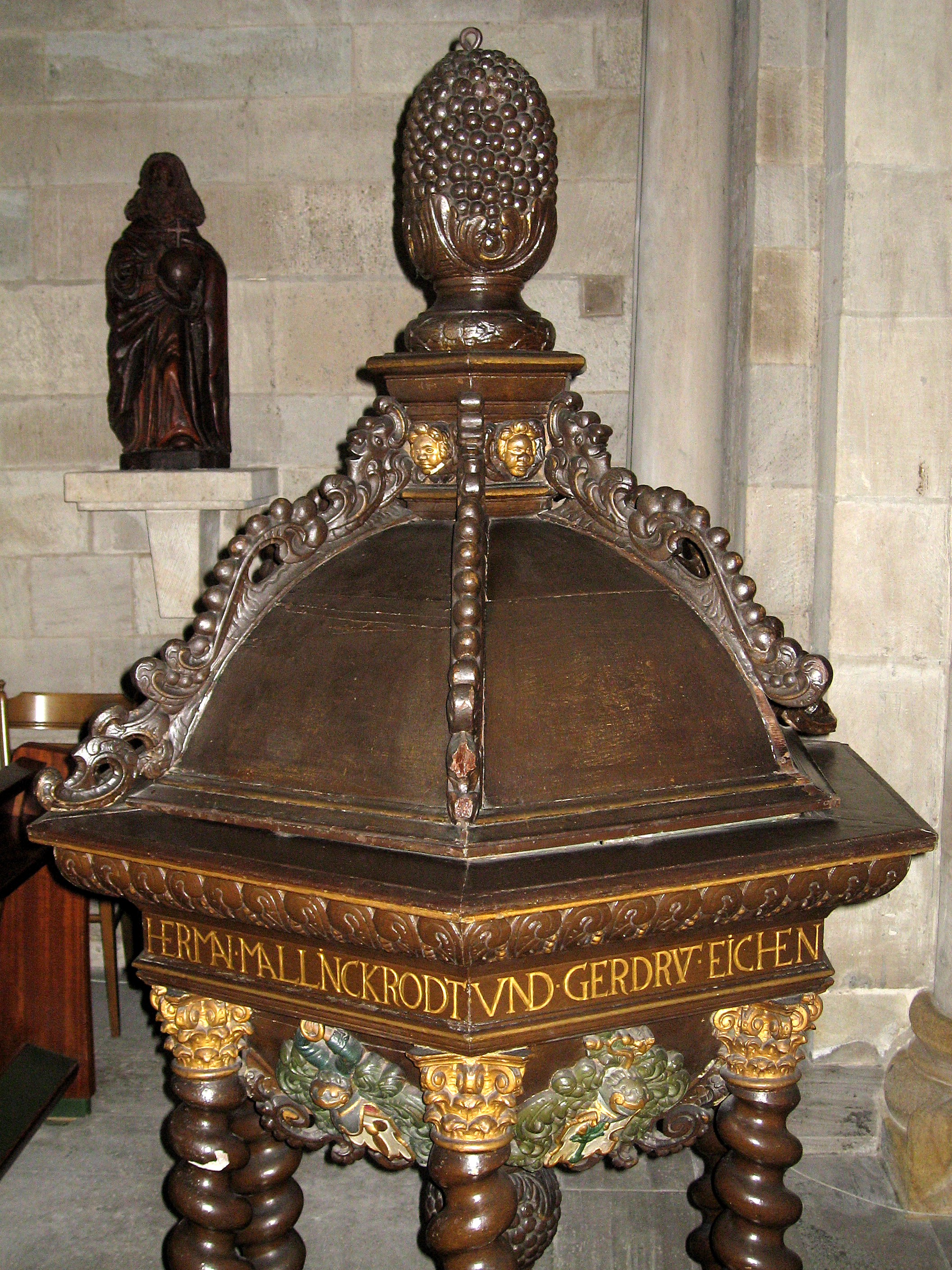 Marienkirche Dortmund, Hauptschiff beim Westeingang, Taufbecken aus Holz, Inschrift: "HERMAN MALLINCKRODT UND GERTRUD EICHEN EHELEUTE HABEN DIESE TAUFE ZUR EHRE GOTTES IN S. MARIAE KIRCHE GEGEBEN ANNO 1687"